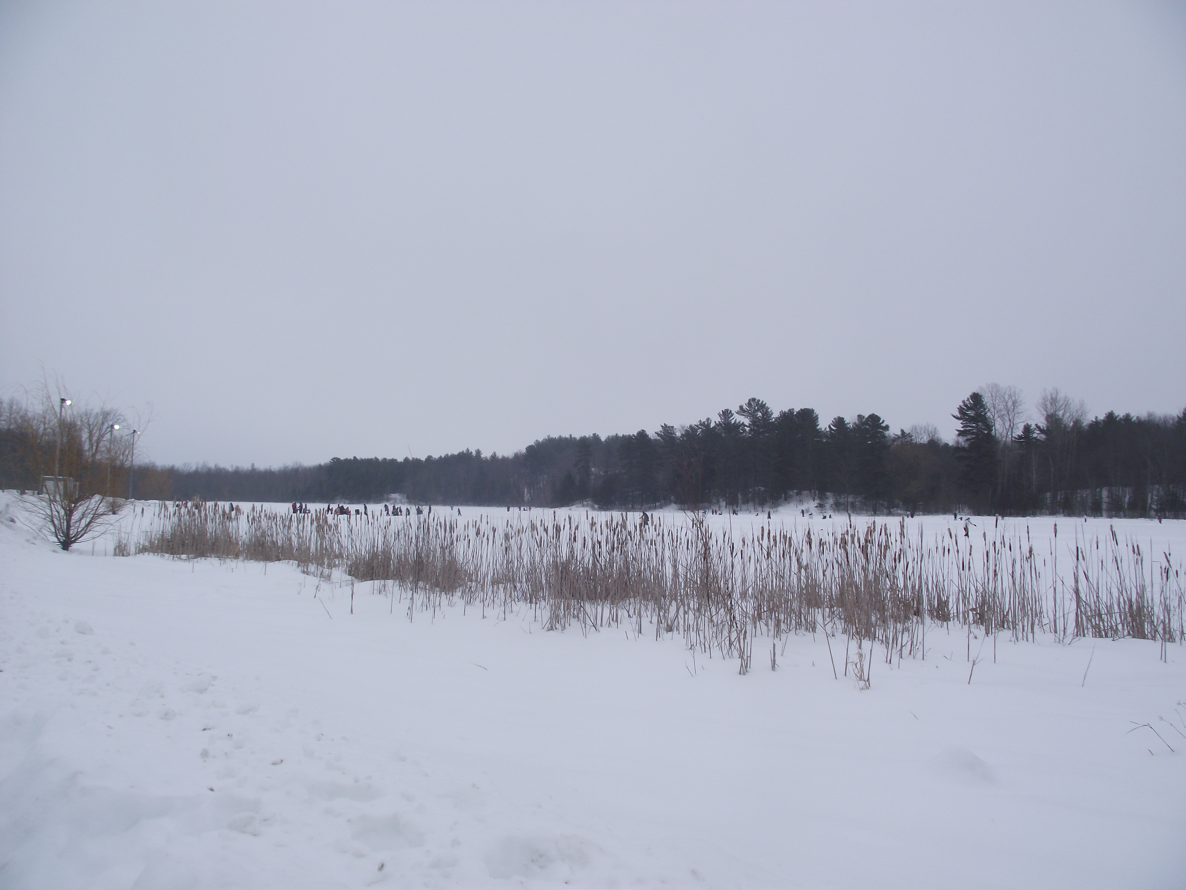 Lac Beauchamp dans le parc du Lac-Beauchamp à Gatineau